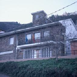 Ayuntamiento del concejo de Illano, Asturias.